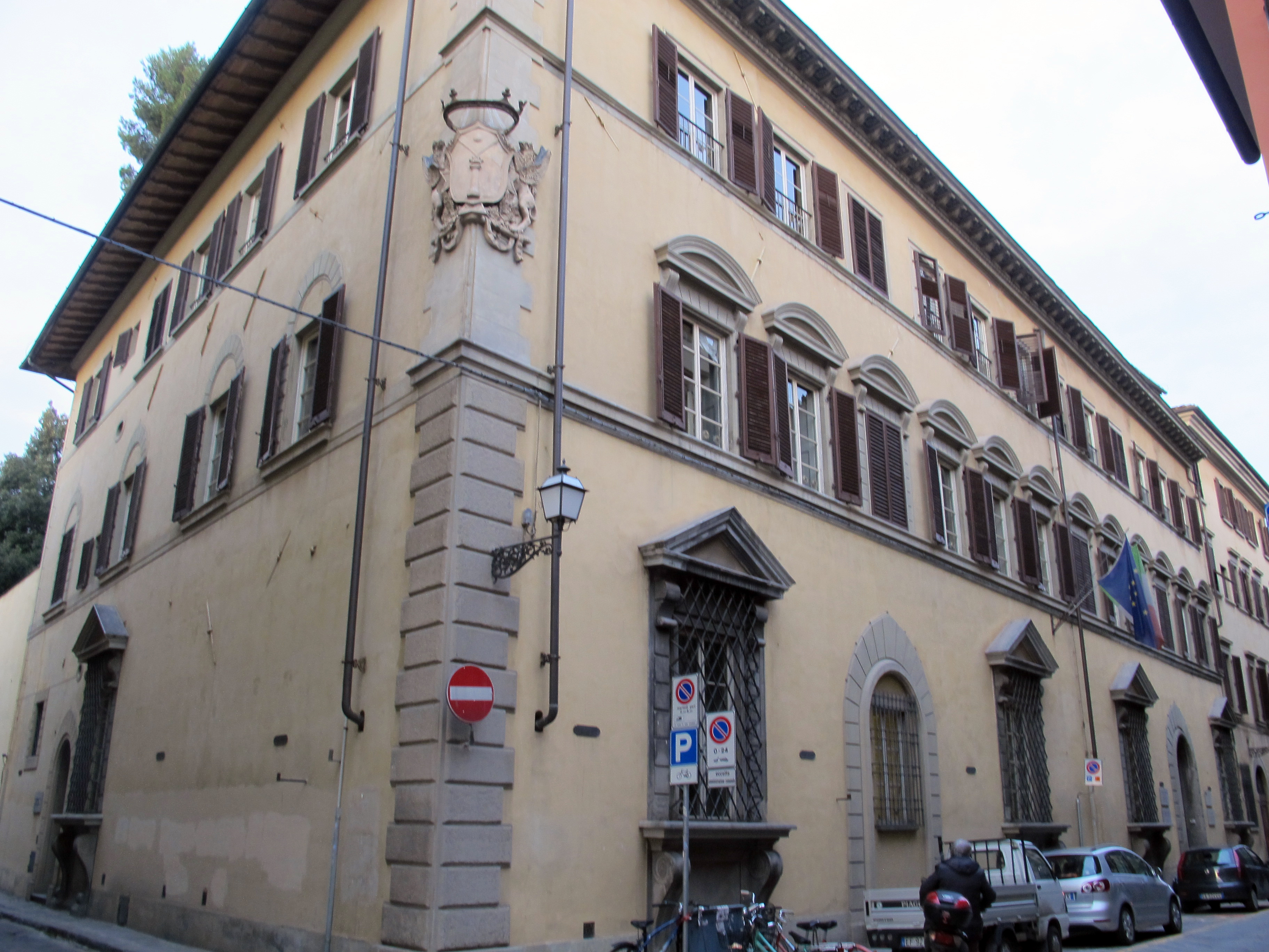 Via ghibellina 30, palazzo vivarelli colonna